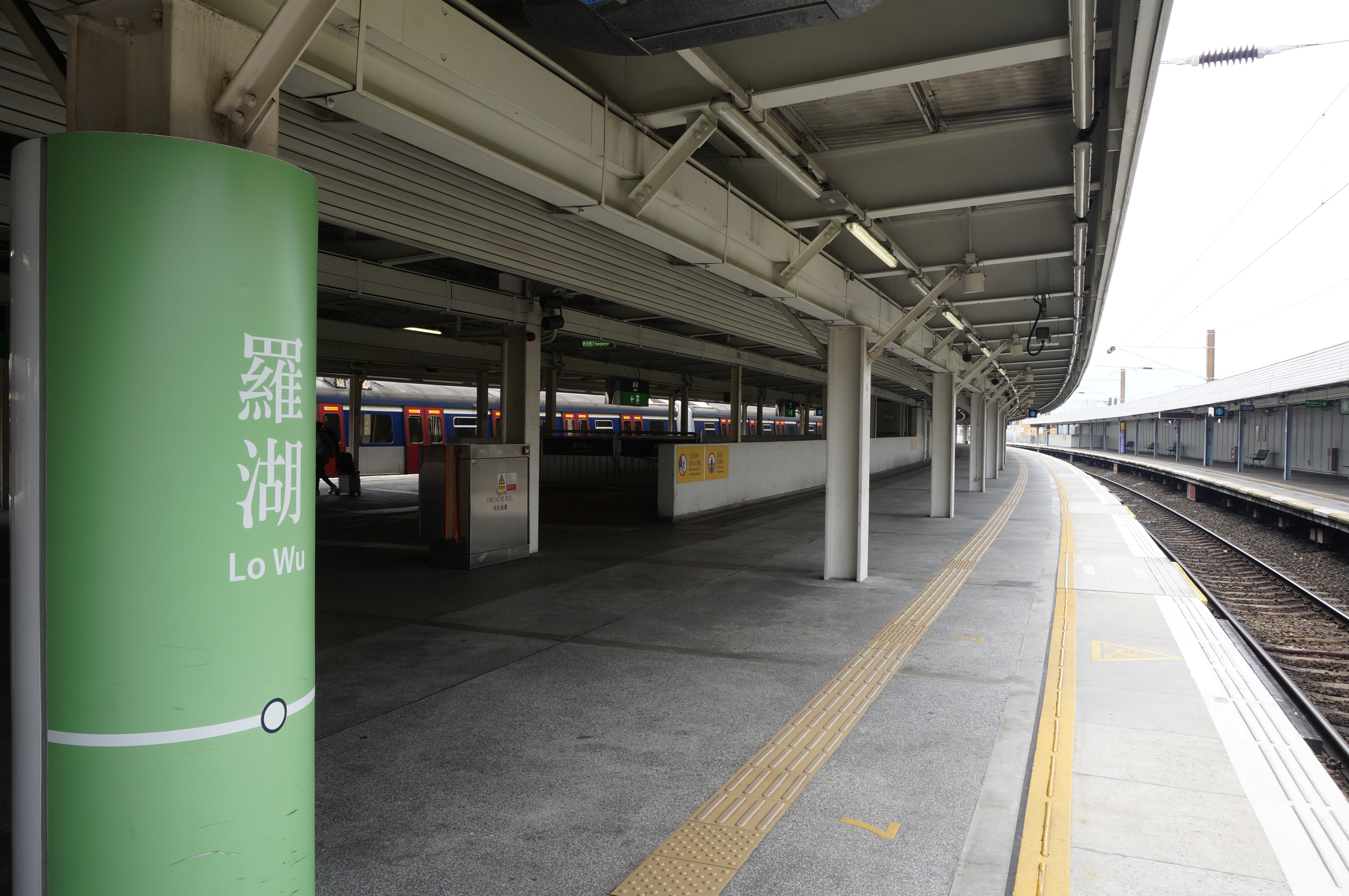 港鐵羅湖站月台